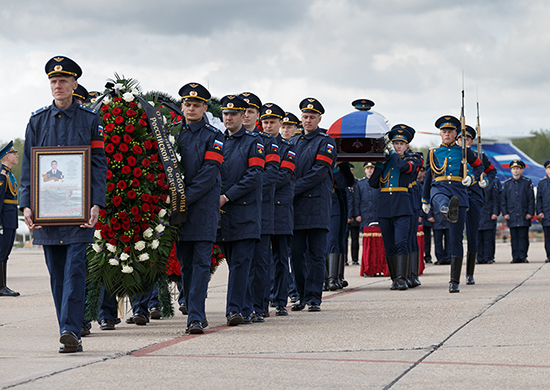 Проводы тела погибшего в Сирии российского спецназовца старшего лейтенанта Александра Прохоренко с военного аэродрома Чкаловский в Оренбургскую область